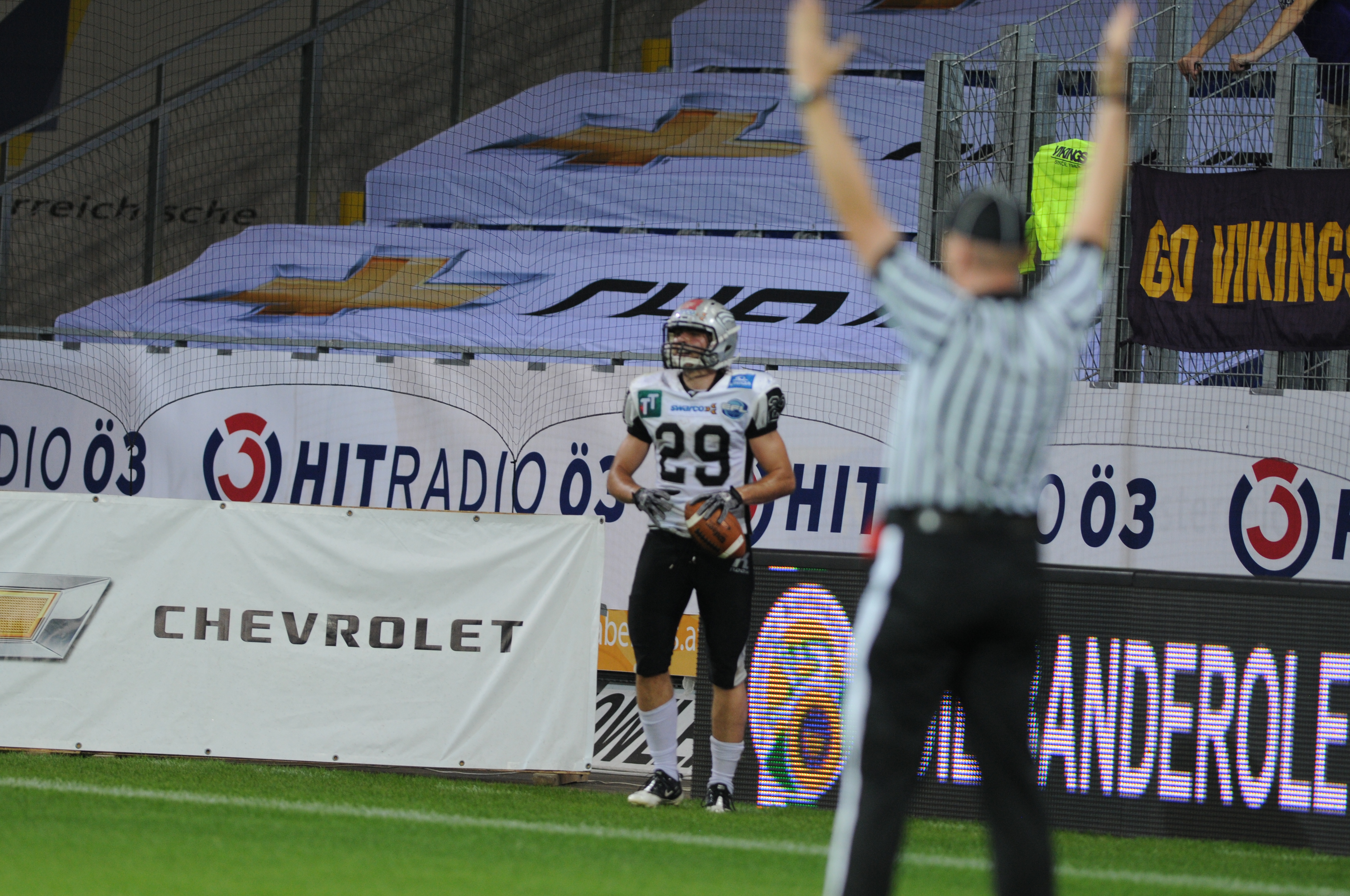 Austrian Bowl XXIX in der NV Arena in St. Pölten